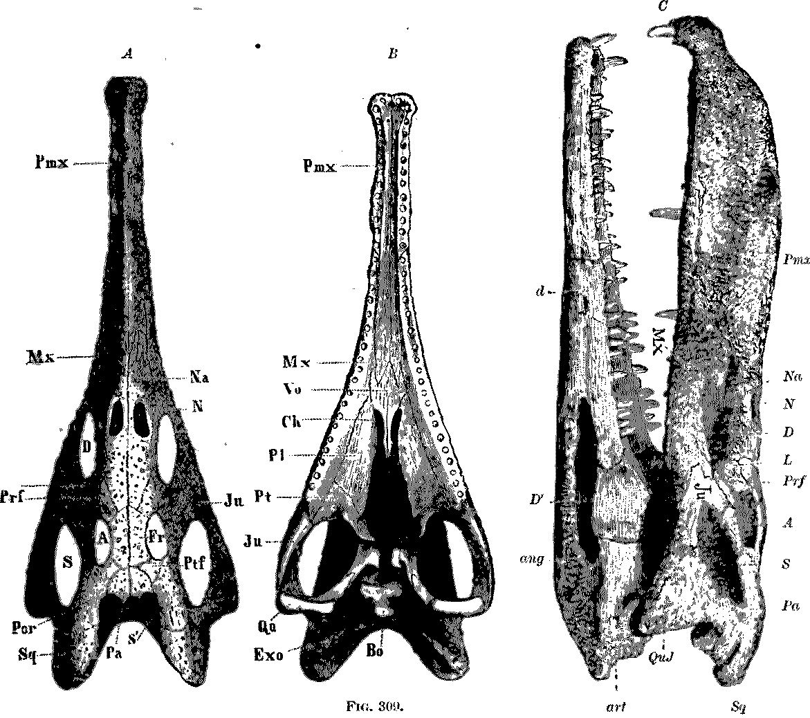 Nicrosaurus scull